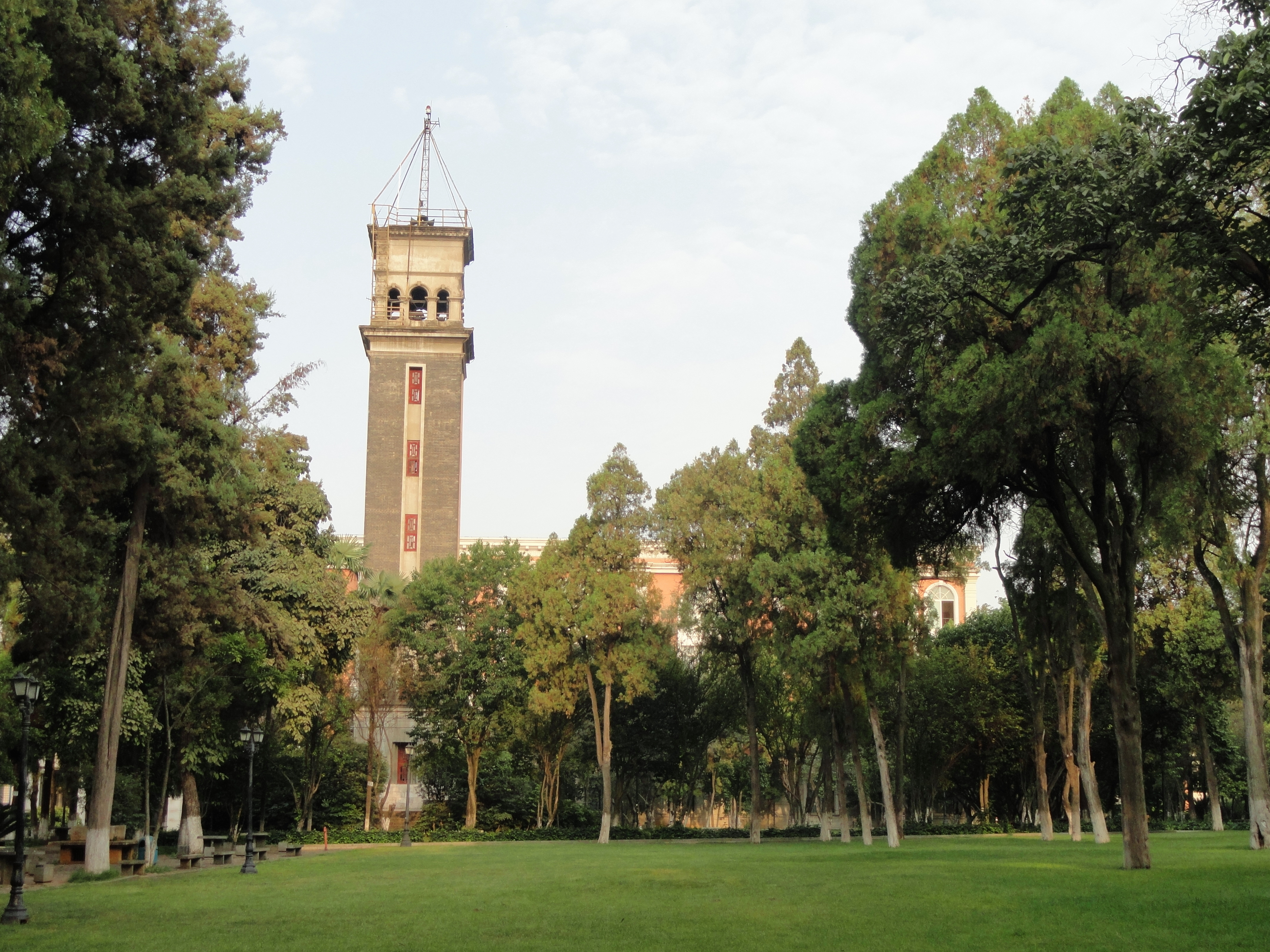 Yunnan University, Kunming, Yunnan, China.